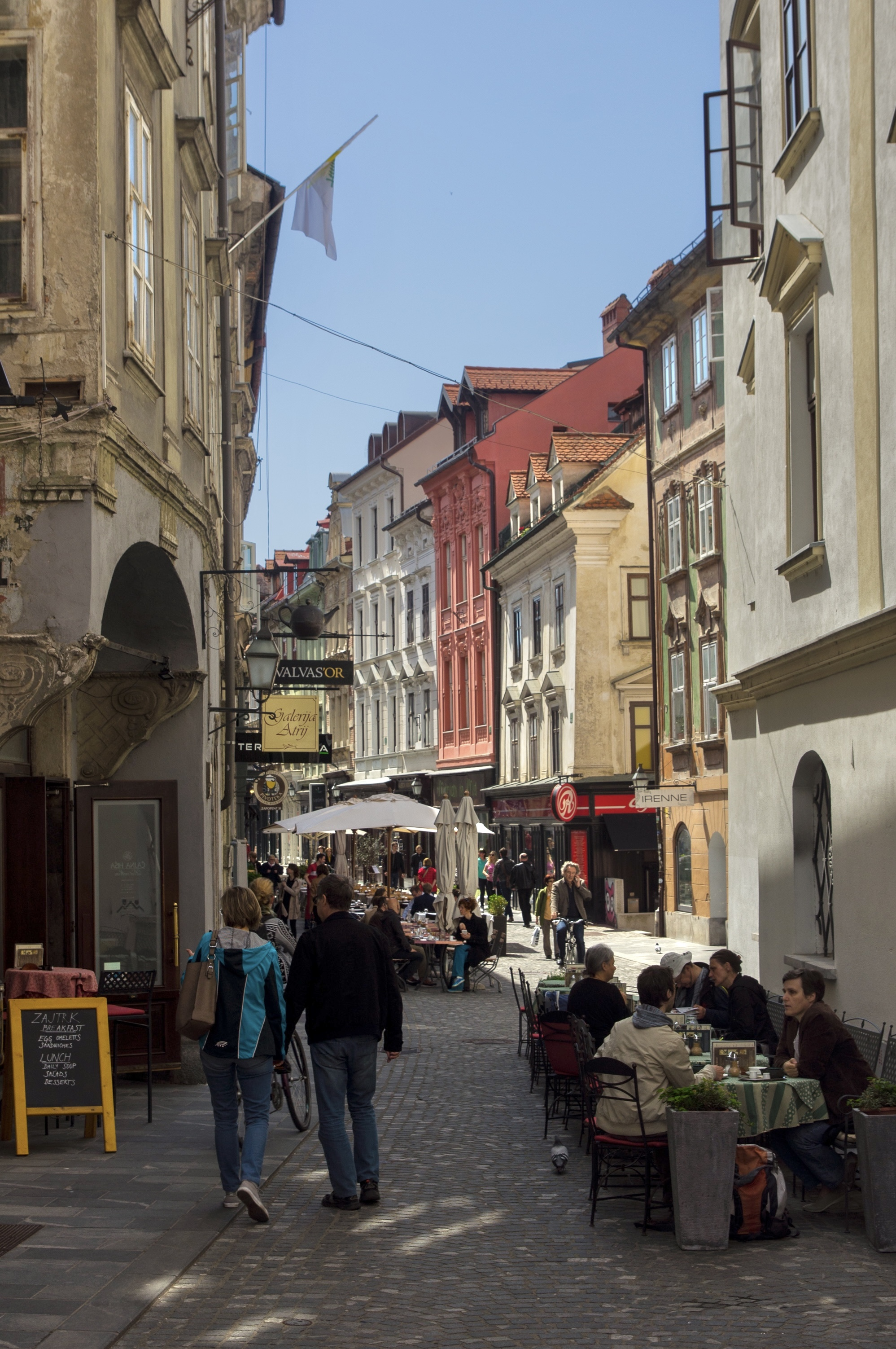 Ljubljana, Slovenia